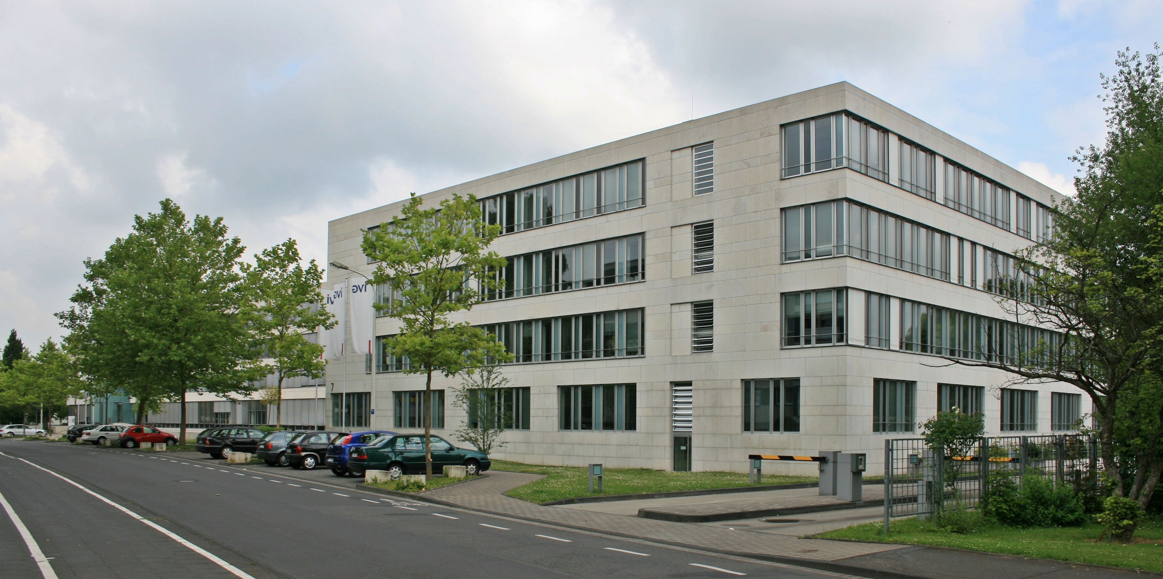 Bonn, Damalige (bis ca. April 2015) Zentrale des Immobilienunternehmens IVG in Bonn-Bad Godesberg.